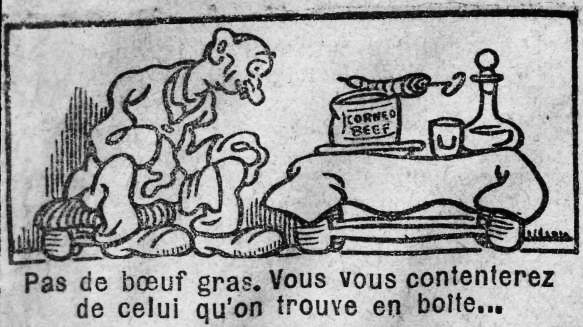 Dessin humoristique paru le mardi gras 17 février 1920 en première page du quotidien Le Journal.